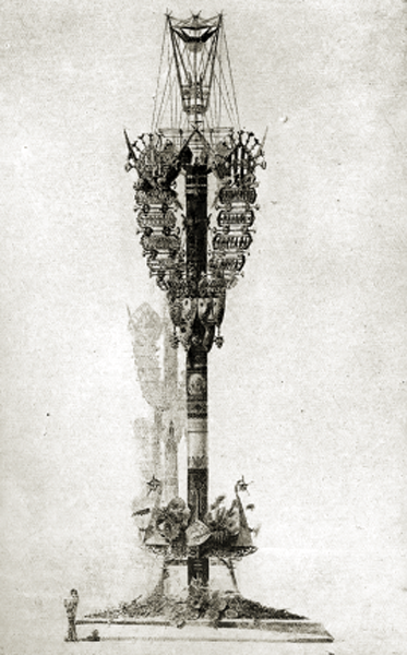 Proyecto de farola para la Muralla de Mar (1880), de Antoni Gaudí.